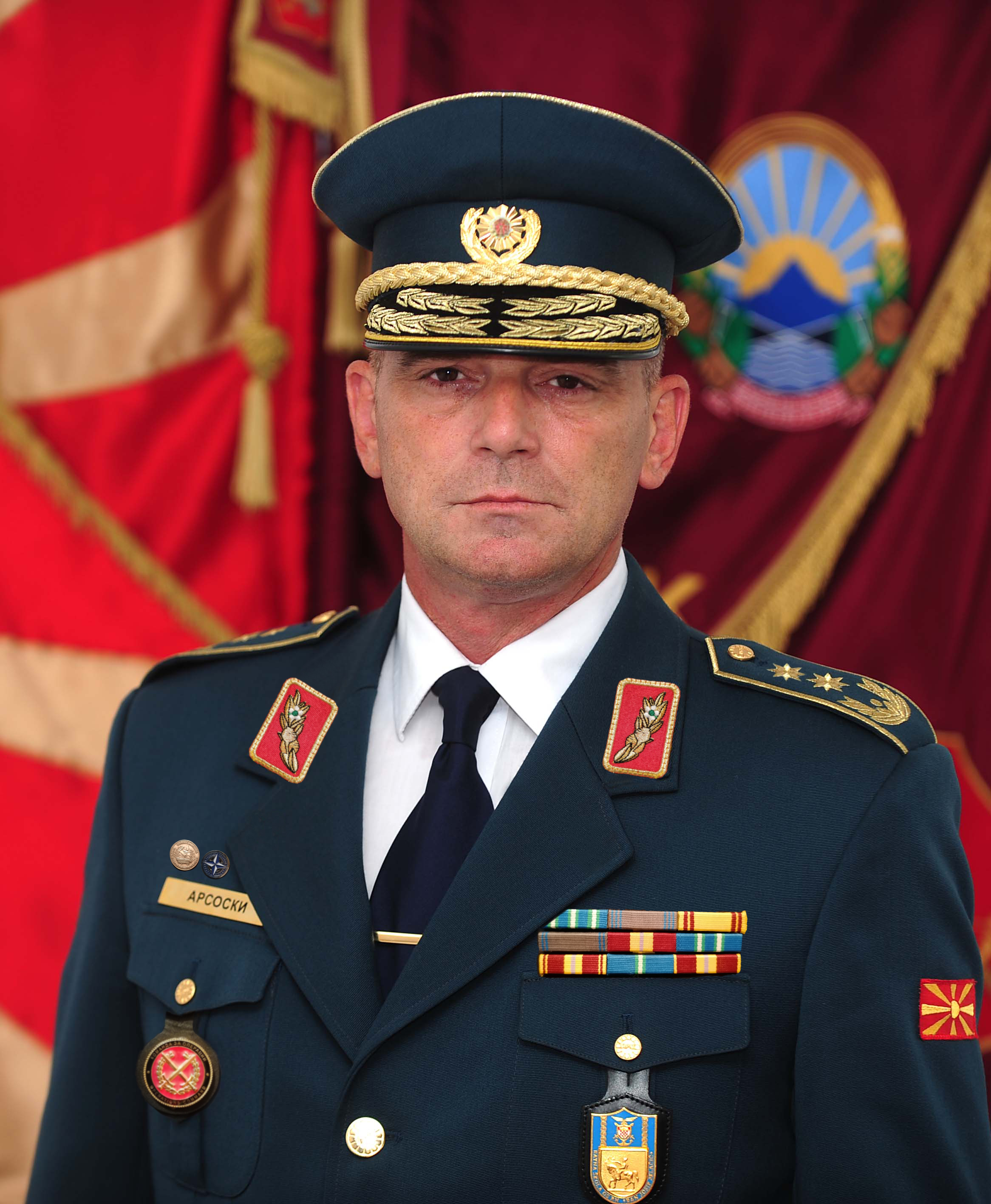 генерал-мајор Павле Арсоски во службена униформа на Армијата